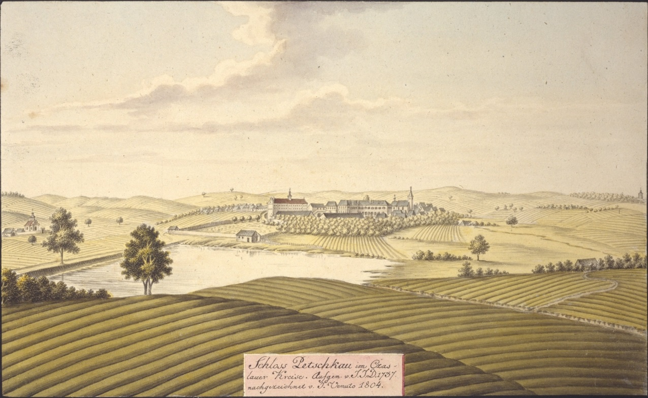 Zámek Červené Pečky Schloss Petschkau im Czaslauer Kreise. Aufgen. v. J.J.D. 1737, nachgezeichnet v. J. Venuto 1804